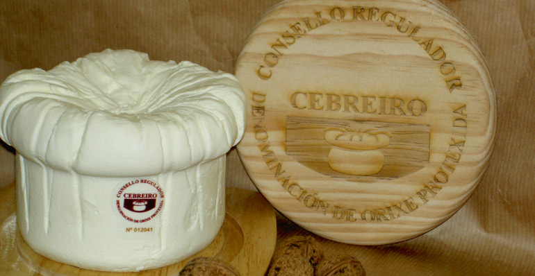 Queso Cebreiro con la contraetiqueta identificativa.